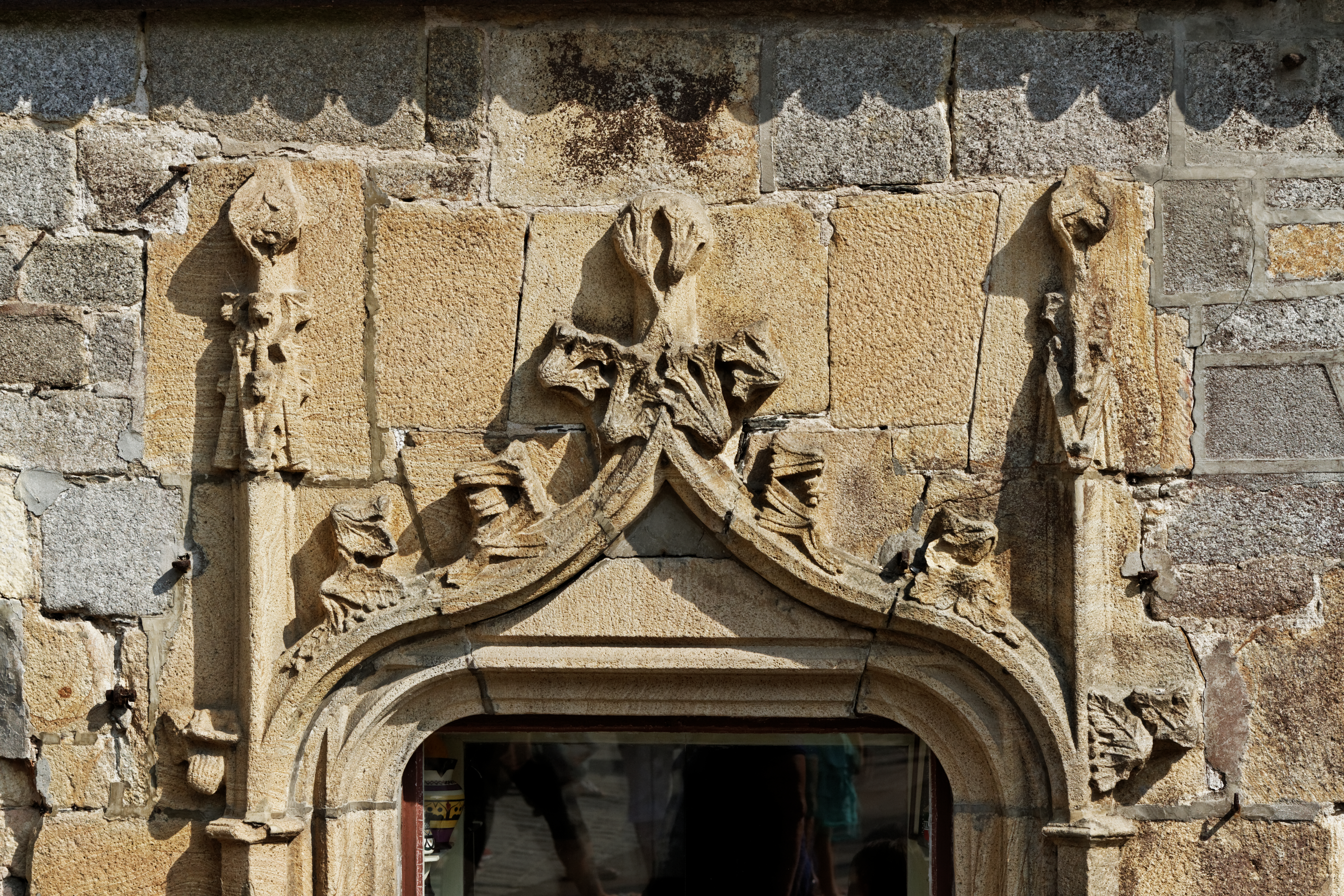 La maison Gérard à Saint Renan dans le Finistère.